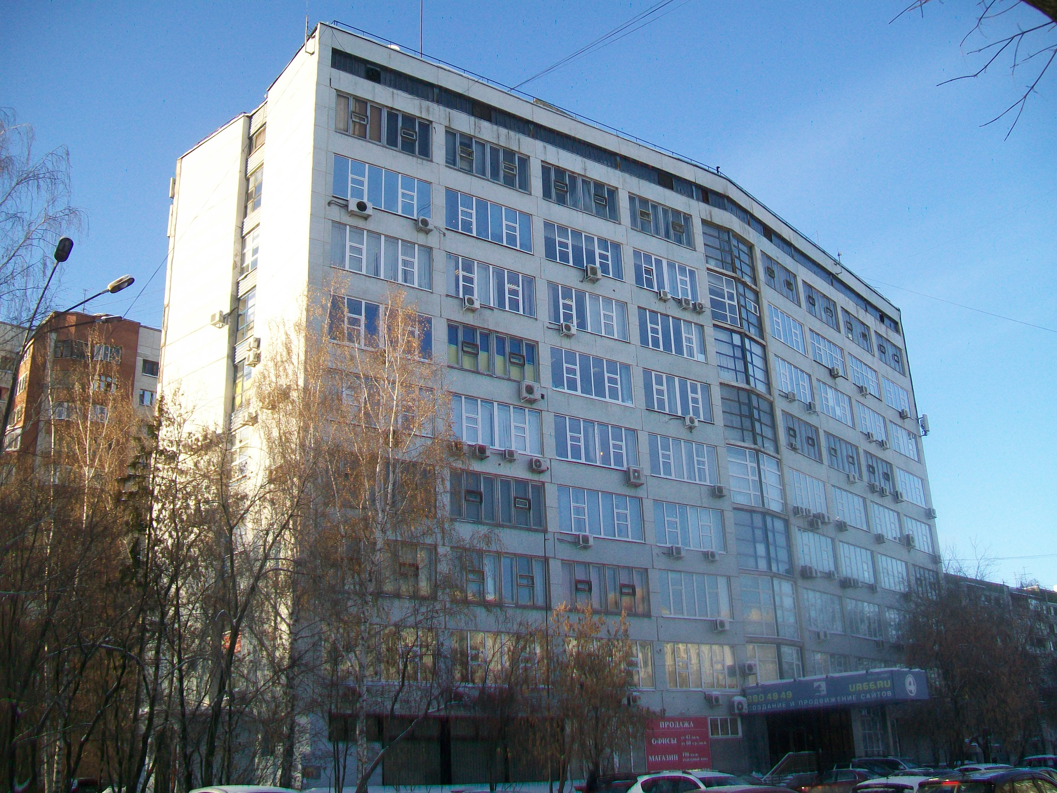 Новое здание института Уралмеханобр, Екатеринбург, улица Хохрякова, 104